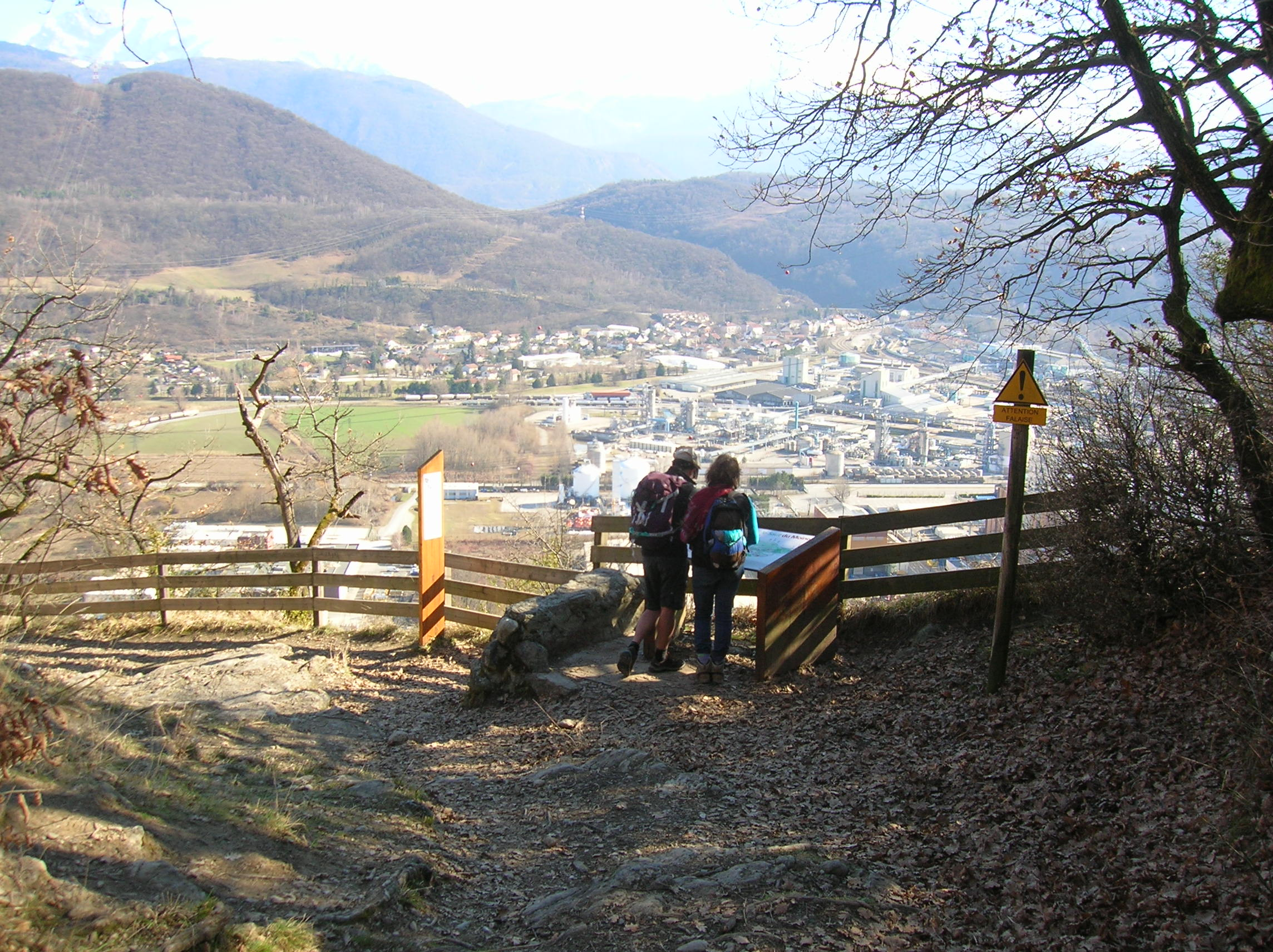 Saut du moine, Champagnier, Isère, AuRA, France.